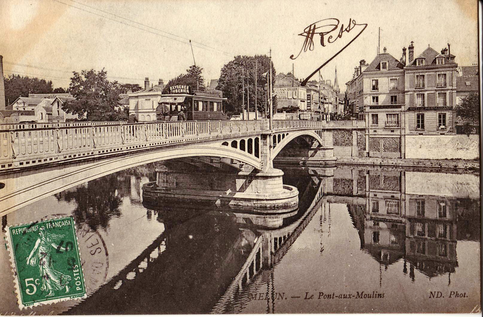 Carte postale ancienne éditée par ND : MELUN - Le Pont aux Moulins